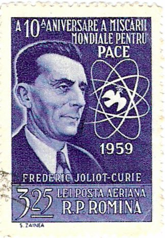 Frederic Juliot-Curie on a Romanian Post stamp